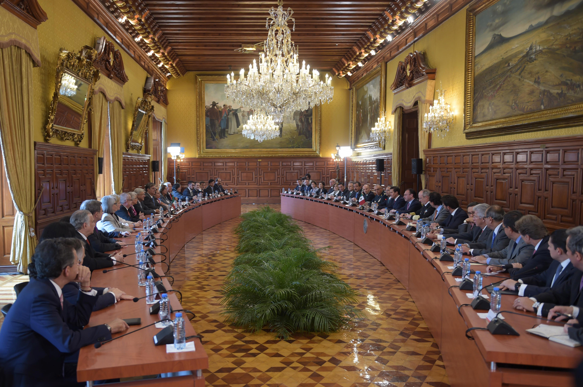 El Presidente Enrique Peña Nieto se reunió con el Presidente Electo, Andrés Manuel López Obrador, el gabinete actual y los titulares de la dependencias del próximo gobierno, para dar inicio formal al proceso de transición.